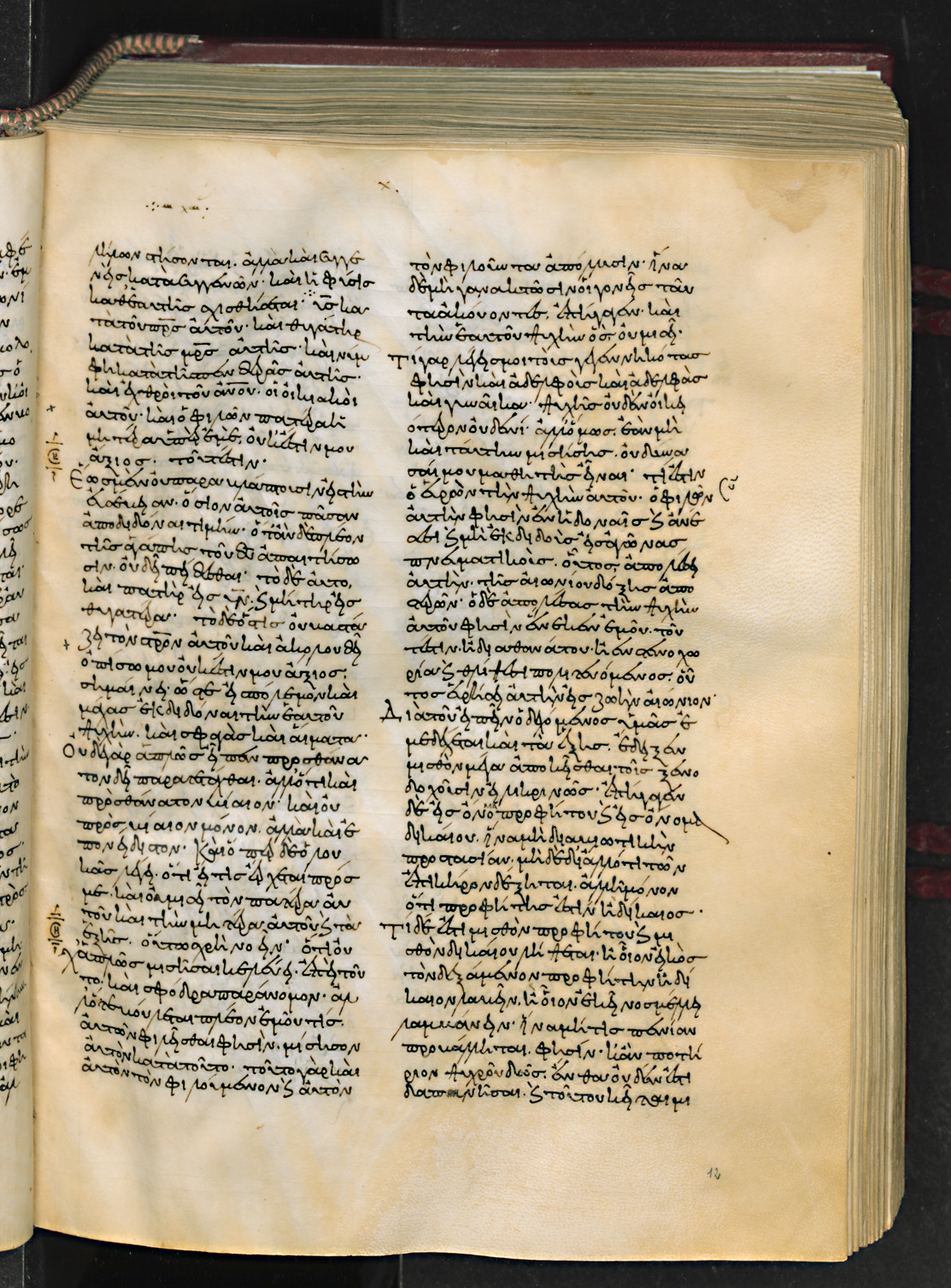 folio 12r